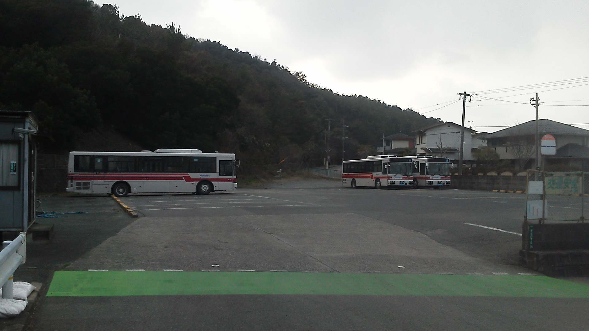 西鉄バス宇美営業所桜ヶ丘車庫（2014年3月9日）。